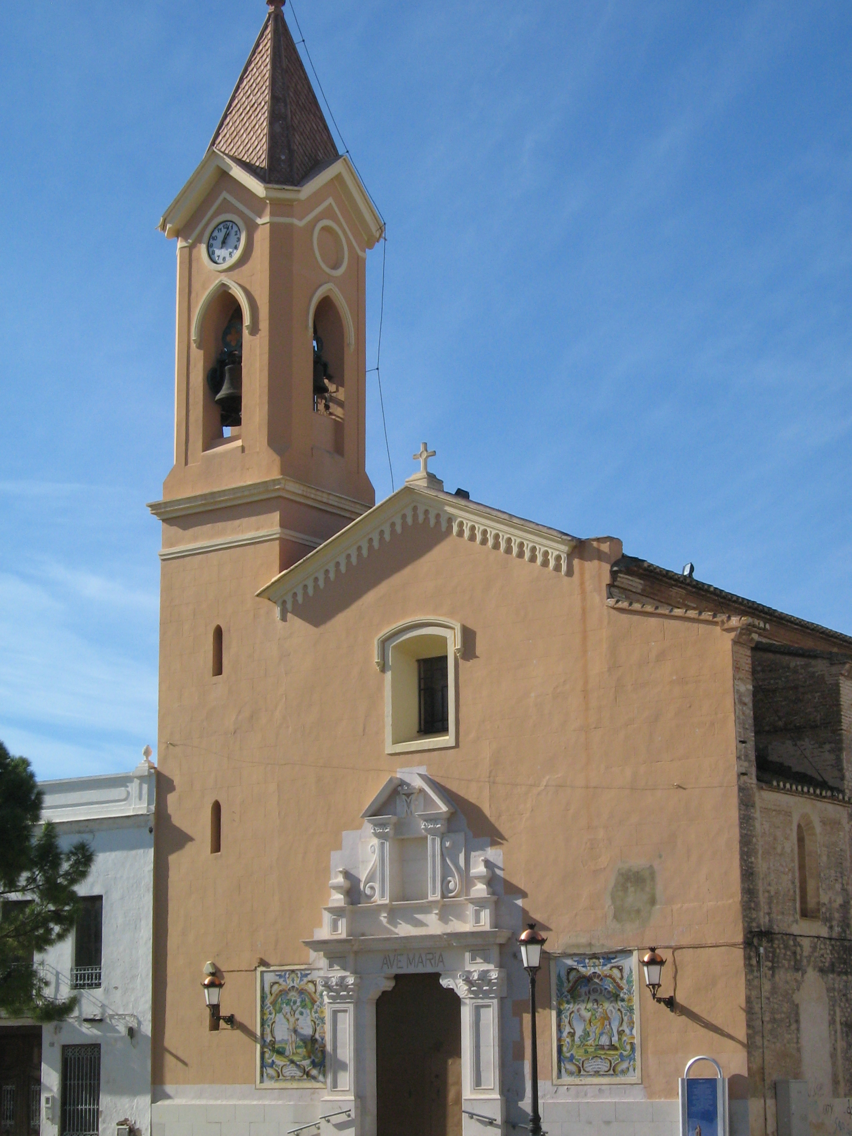 Iglesia de Benetússer